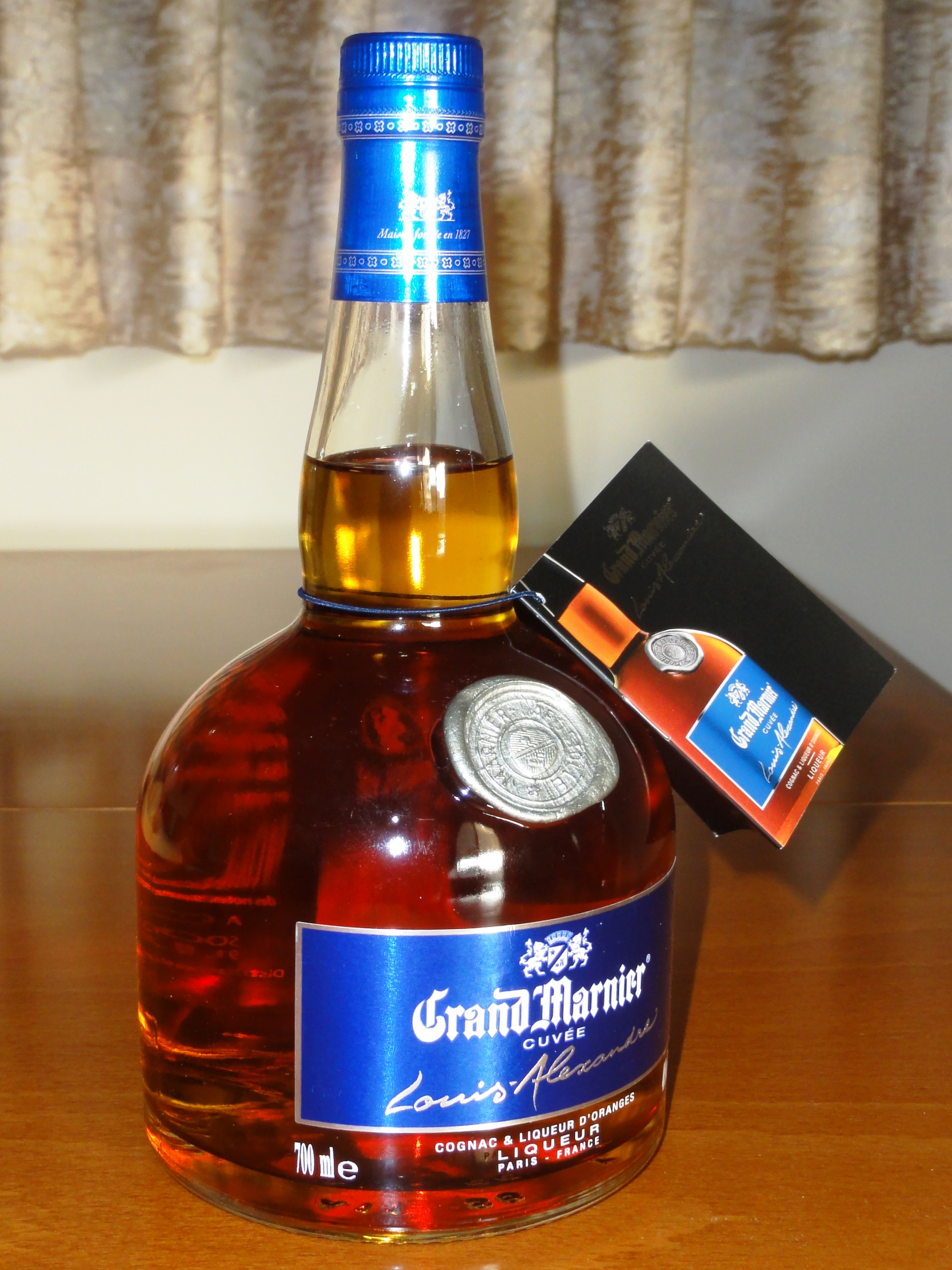 Grand Marnier Cuvée Louis-Alexandre